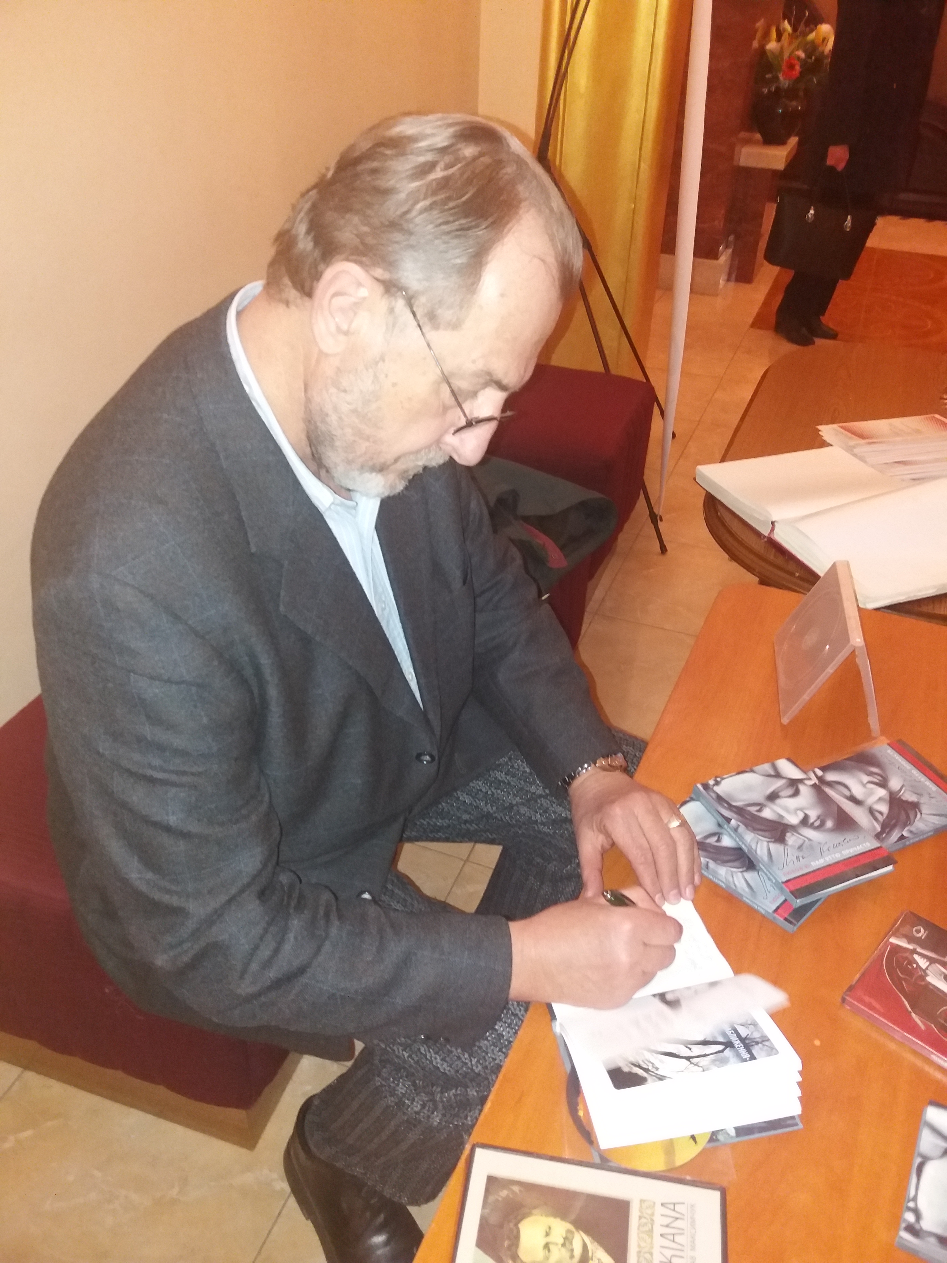 Зиновій Суходуб у Львівській обласній філармонії. 12.03.2018